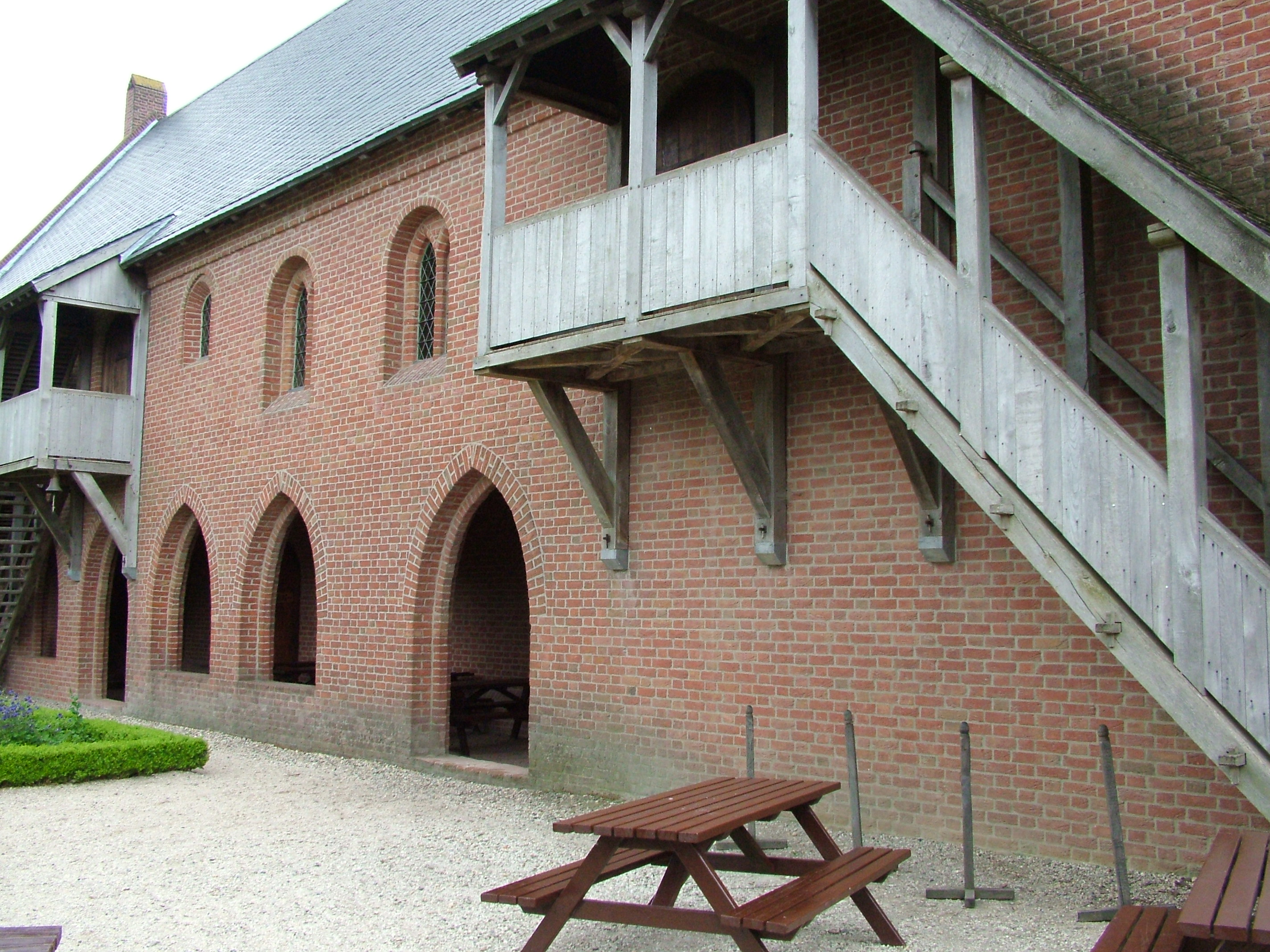 Archeon, klooster